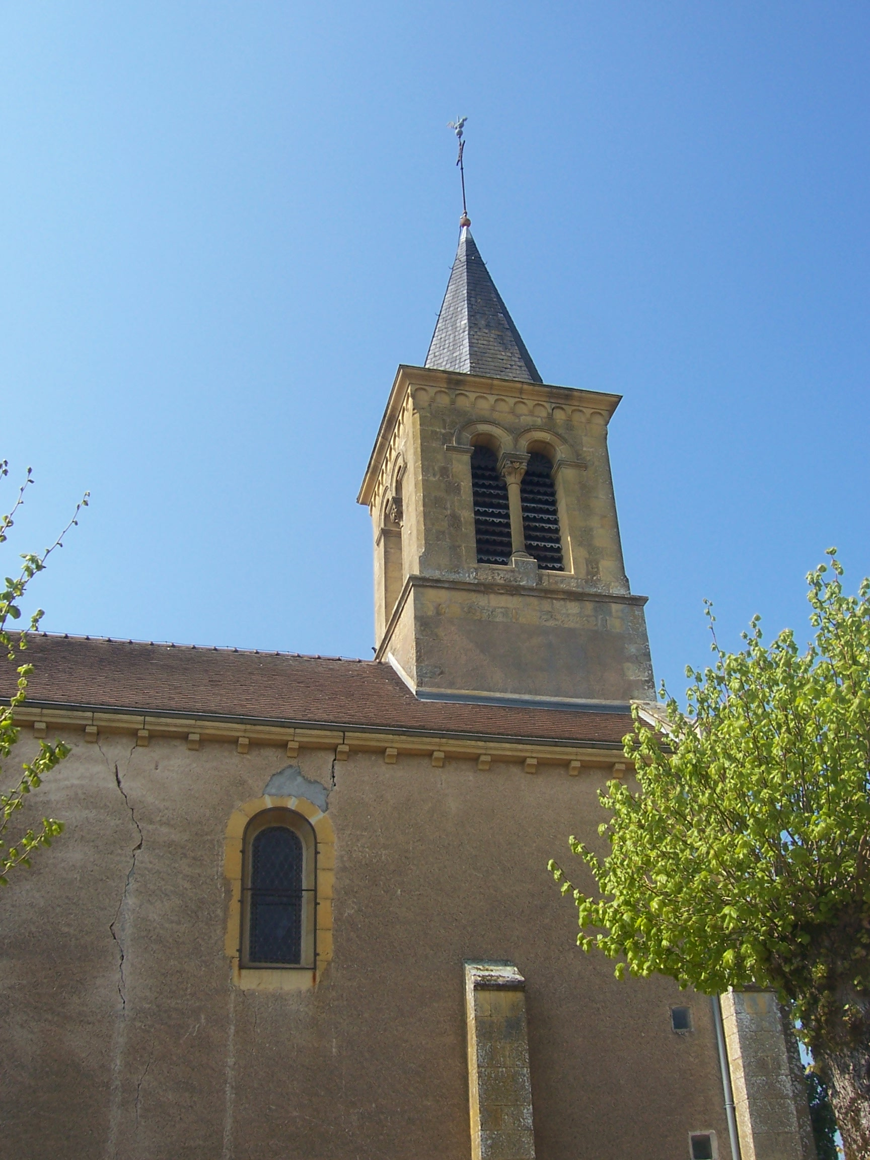 Elise de Prizy